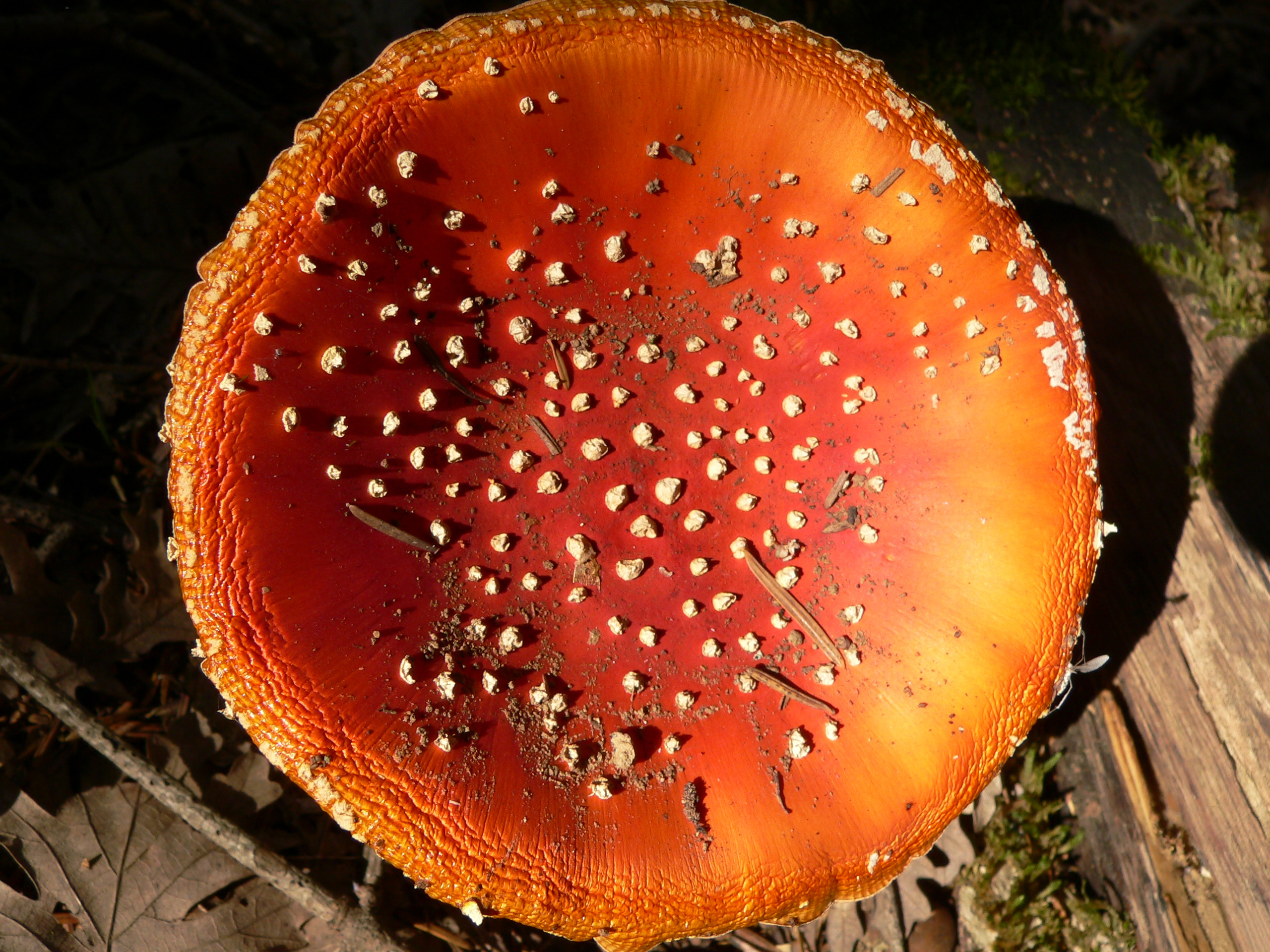 Μανιταρια